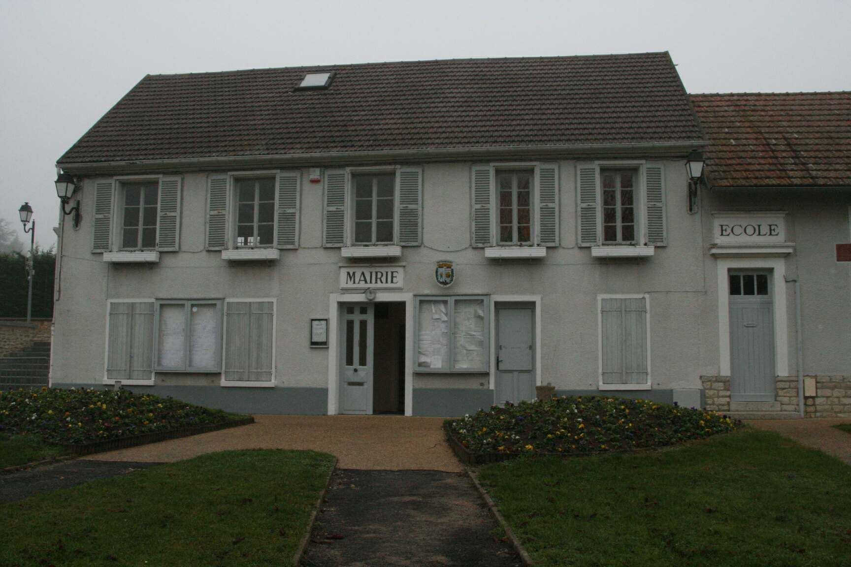 Mairie de Guitrancourt - Yvelines (France)